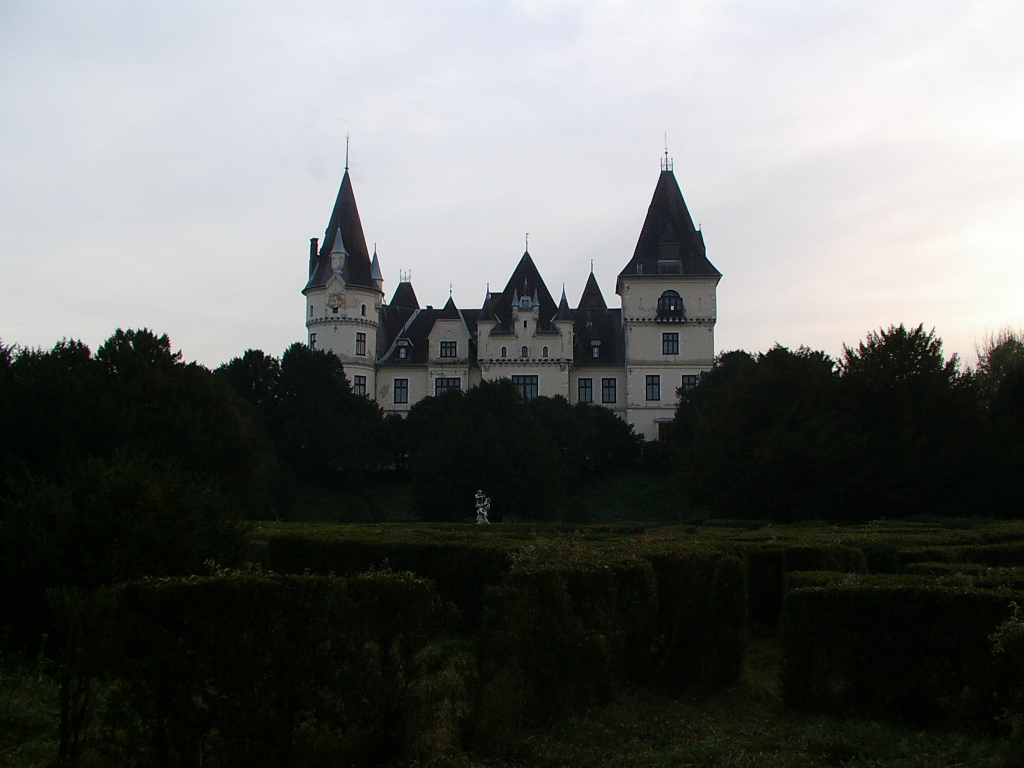 Andrássy kastély Tiszadobon, saját kép.